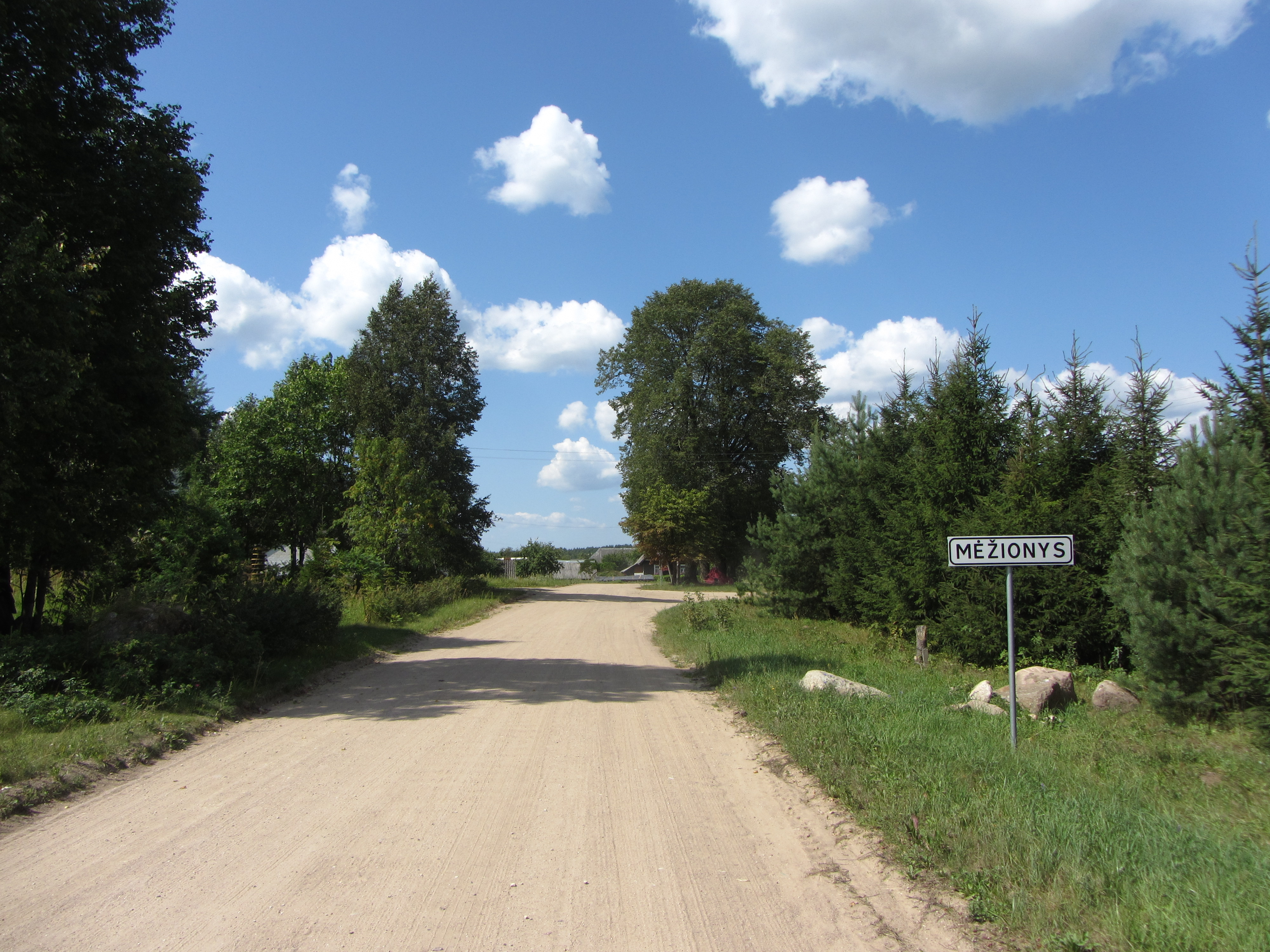 Mėžionys 18120, Lithuania